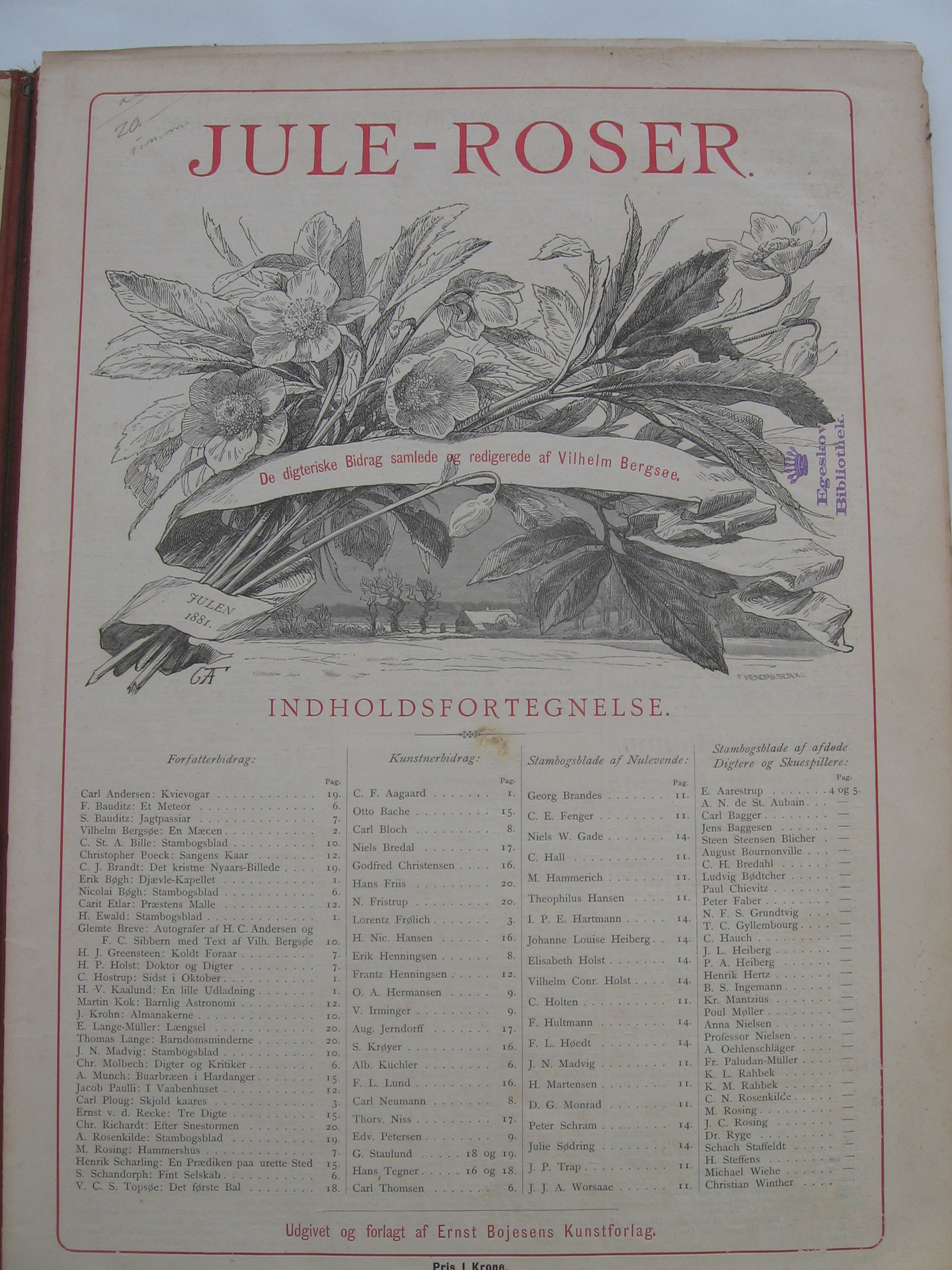 Innhalssida til første heftet av Juleroser 1881